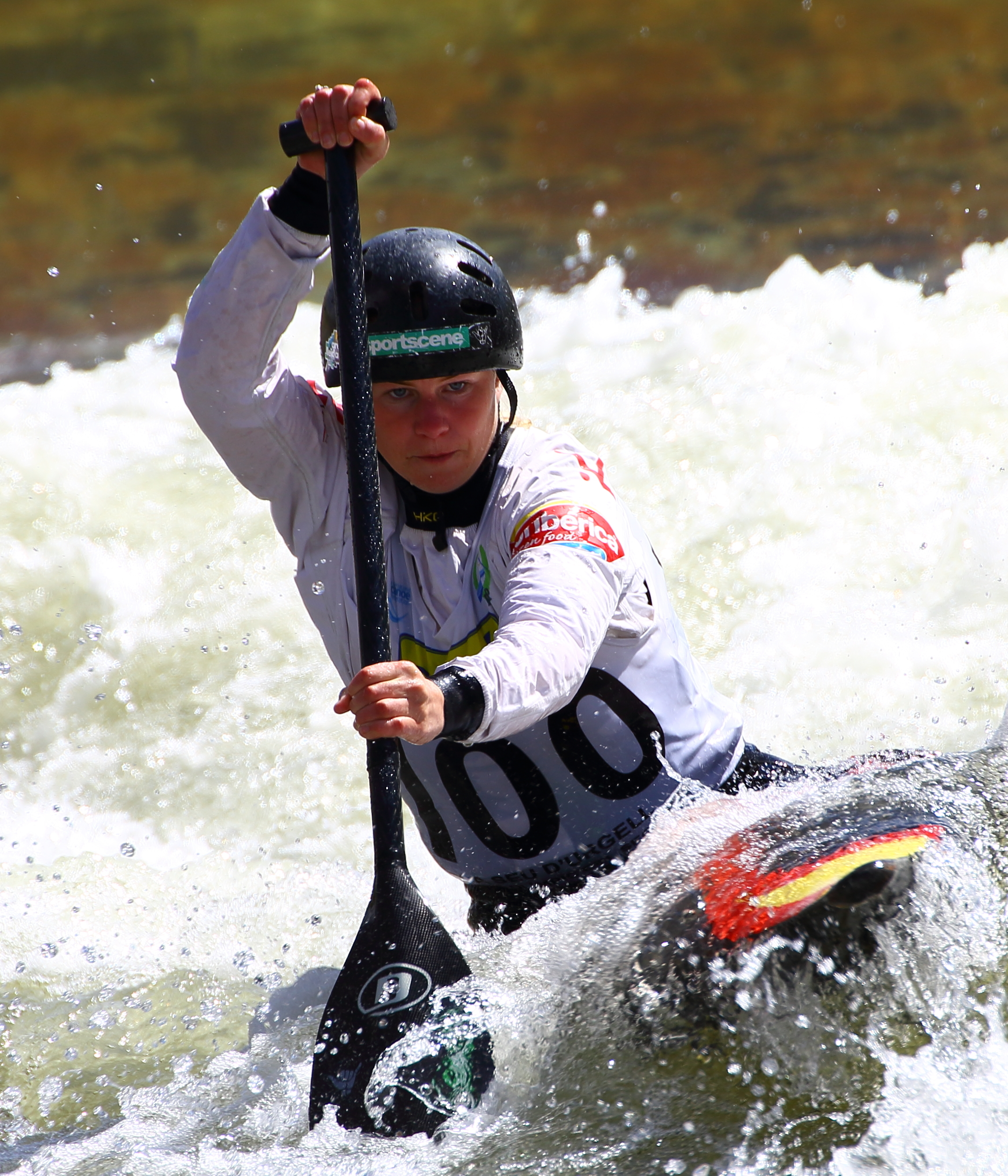 2ª Copa de España de Slalom Olímpico Seo de Urgel Equipo: Cadí C.K